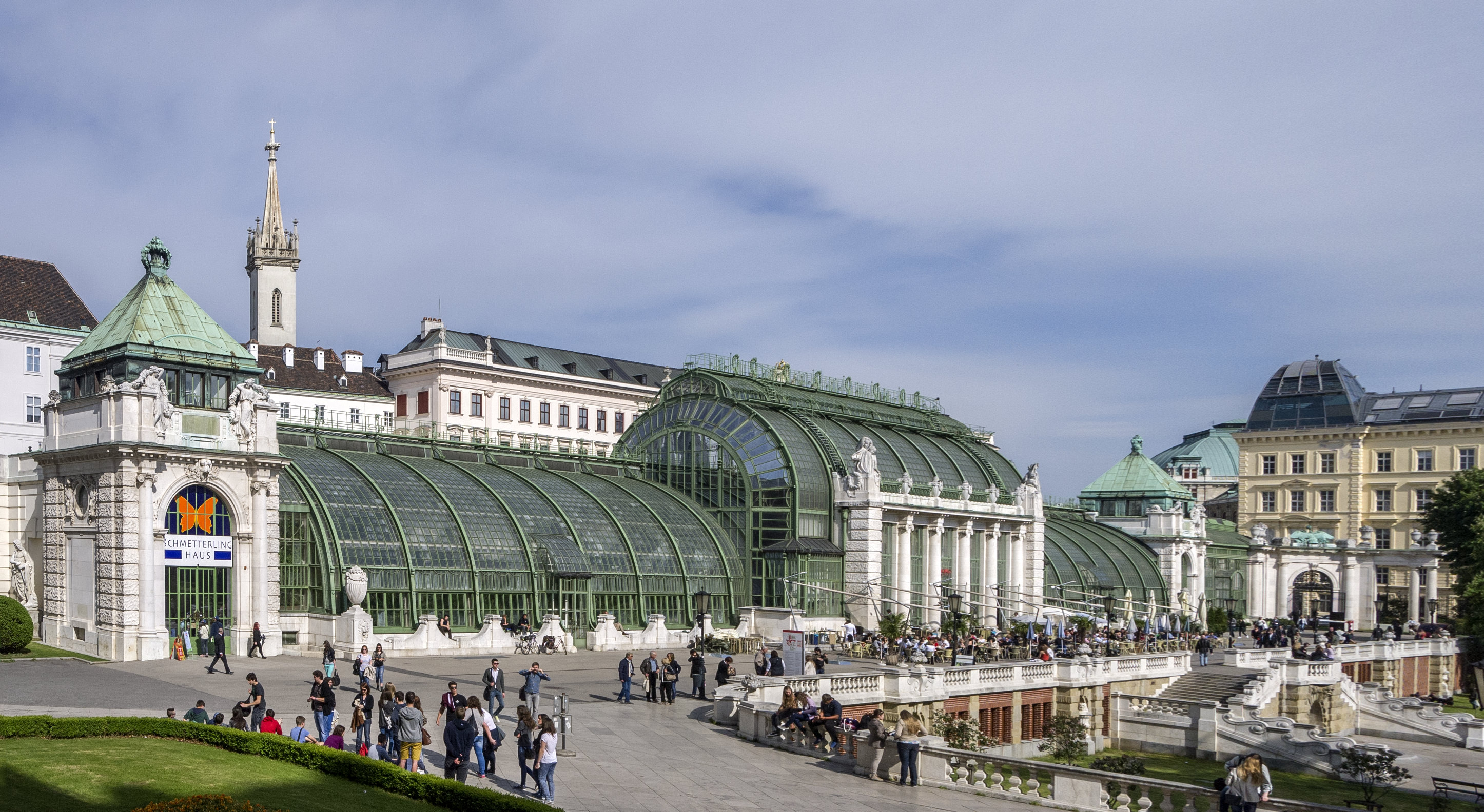 Palmenhaus